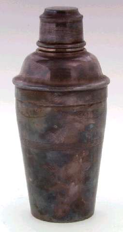 Cocktailshaker fra ca 1930 i forsølvet metall . Den er produsert i London og brukt i Oslo. Stemplet: THE ALEX B CLARK COMPANY L TD LONDON. Foto Norsk Folkemuseum, NF.1976-0544AB.